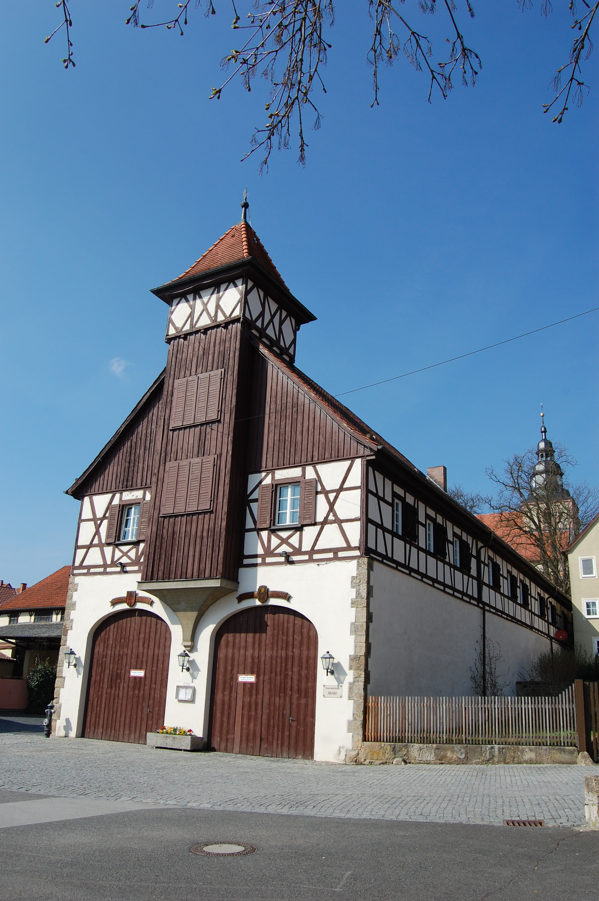 Ostheim vor der Rhön, Feuerwehrhaus (2011)